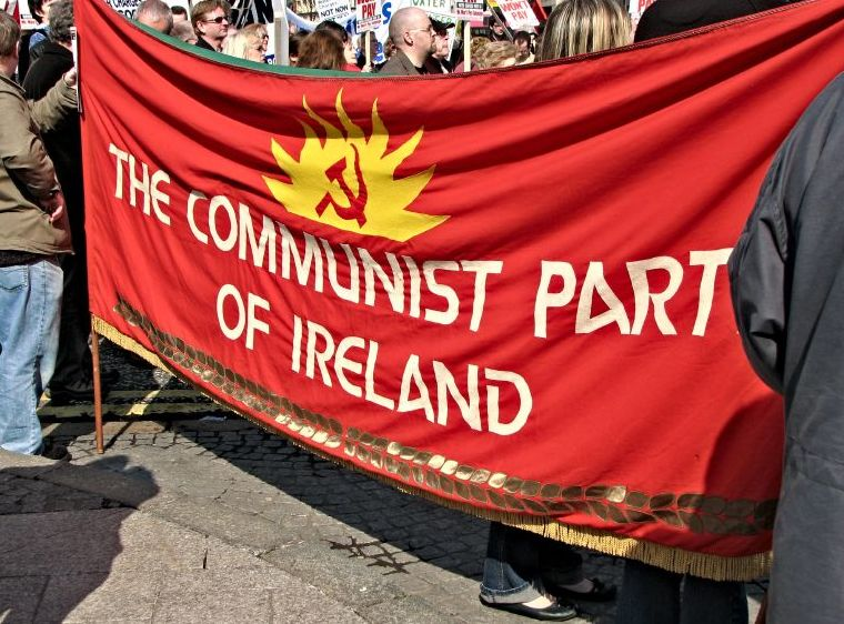 Manifestadeg.